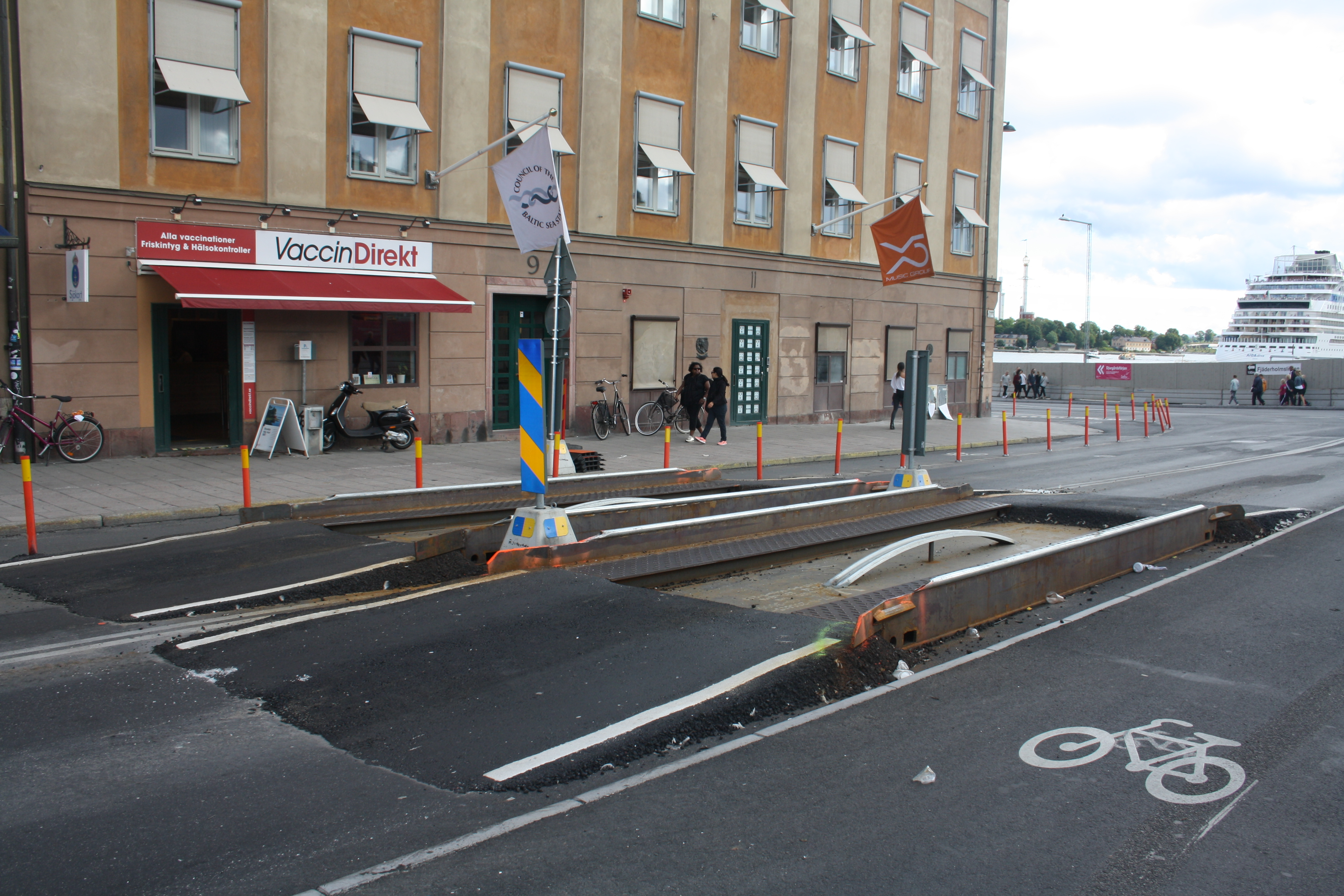 Spårviddshinder på Slussplan